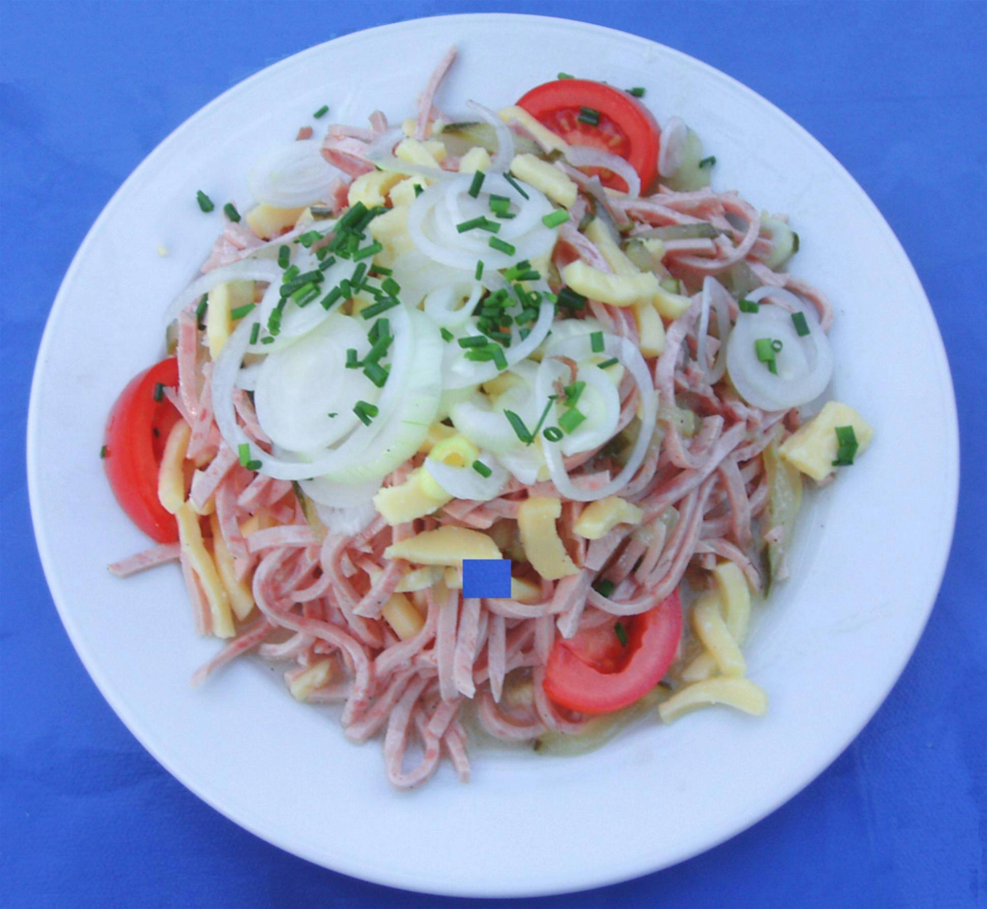 Schweizer Wurstsalat in einem Gartenrestaurant